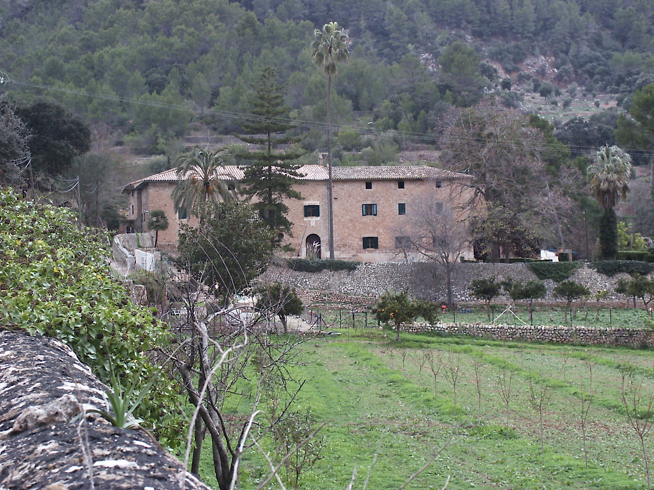 Possessió de Son Brondo. Valldemossa. Mallorca.